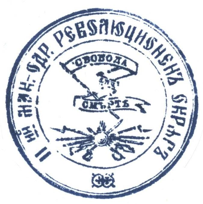 Печат на Втори битолски революционен окръг на ВМОРО.